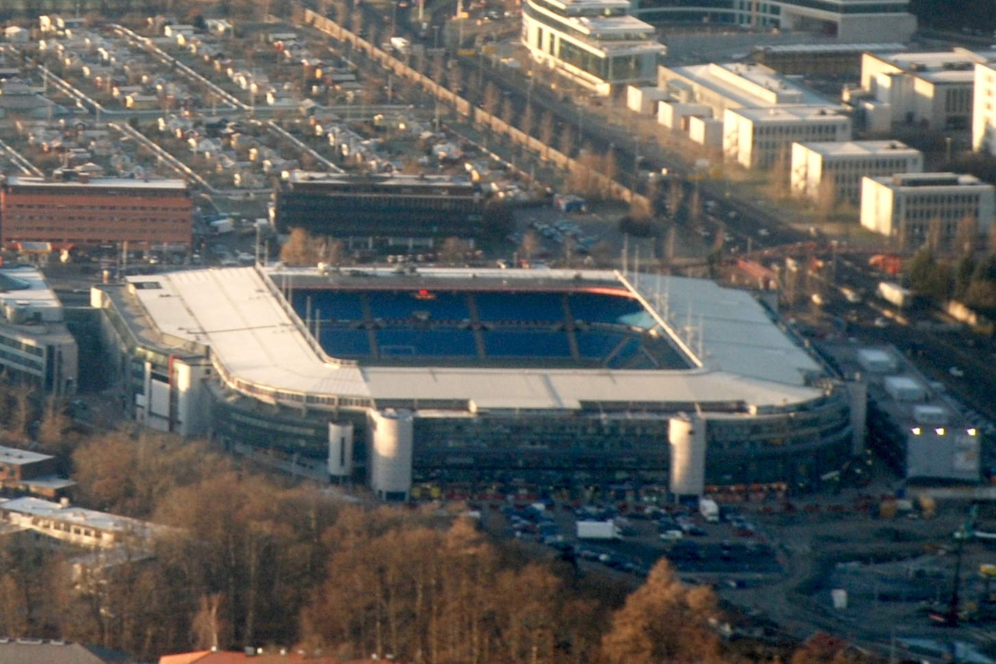 Ullevaal Stadion i Oslo.